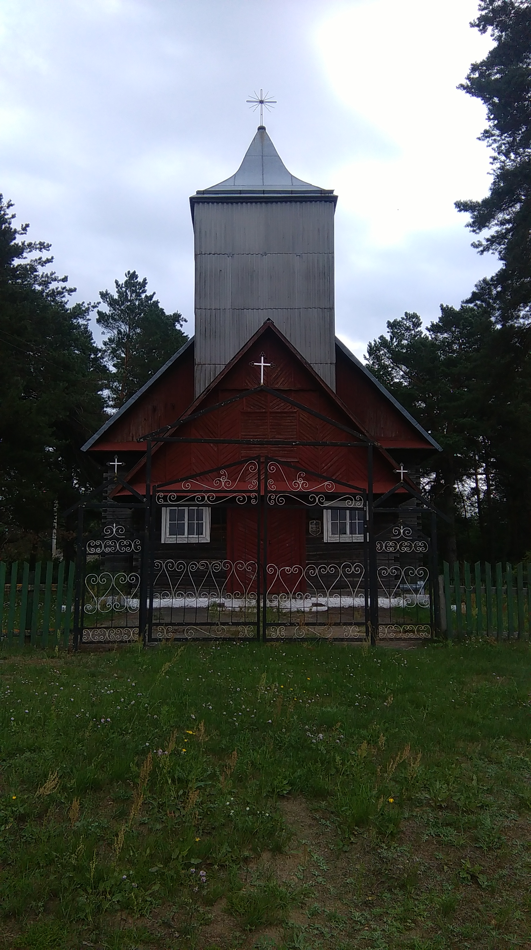 Kościół św. Józefa w Rudzie Jaworskiej